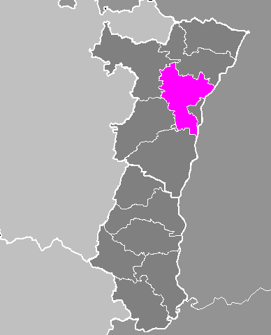 Maps of arrondissements and cantons of France: Arrondissement de Strasbourg-Campagne.PNG (Région Alsace)